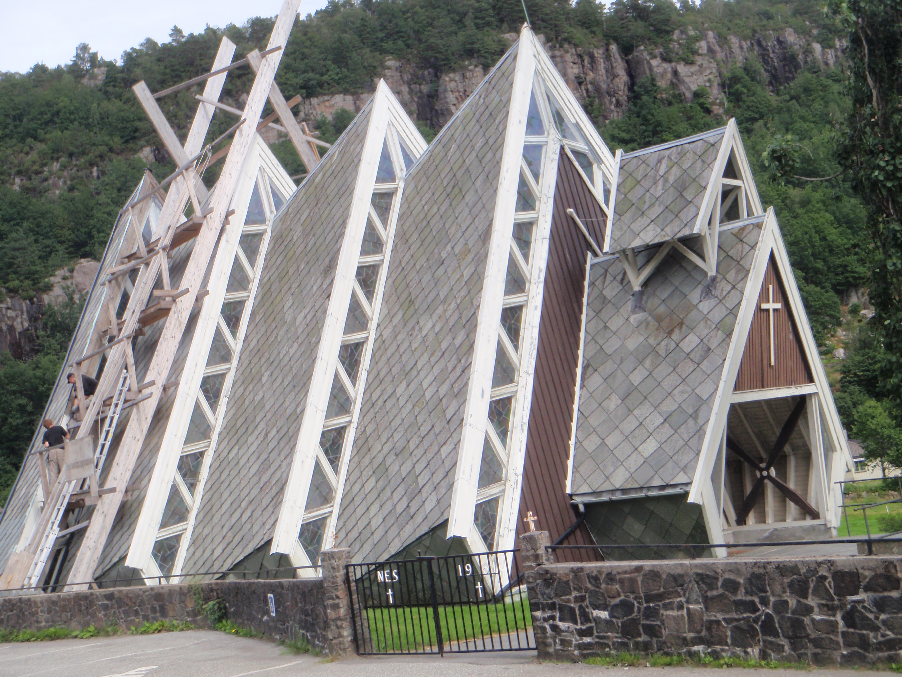 Ett av to gravkapeller til Flekkefjord kirke. Det betjener pr.2012 to gravplasser